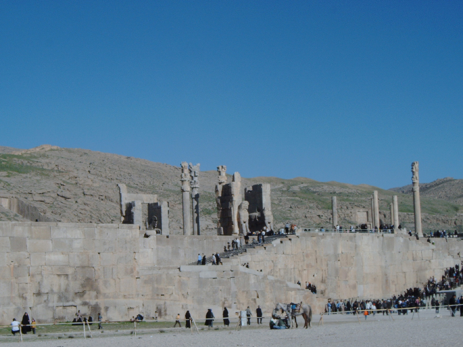 Dieses Foto habe ich selbst gemacht. Das ist die antike Ruinenstadt Persepolis